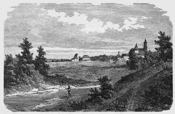 Вигляд містечка Кодня Волинської губернії.